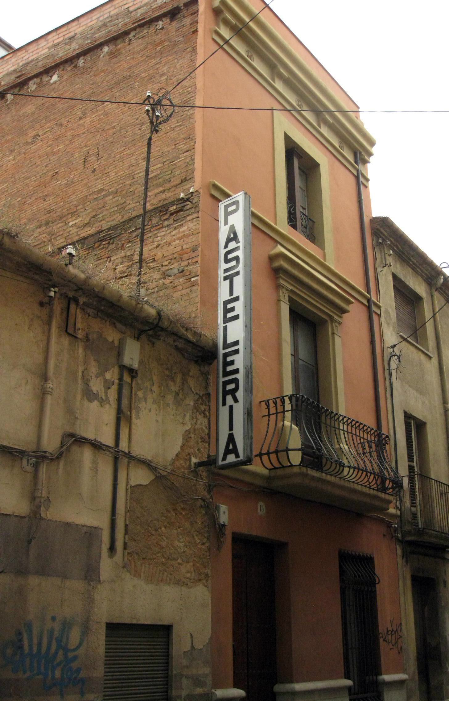 Casa Vicenç Carner, al carrer de Sant Antoni núm. 15 (Terrassa). Edifici eclèctic d'Antoni Pascual i Carretero (1904).